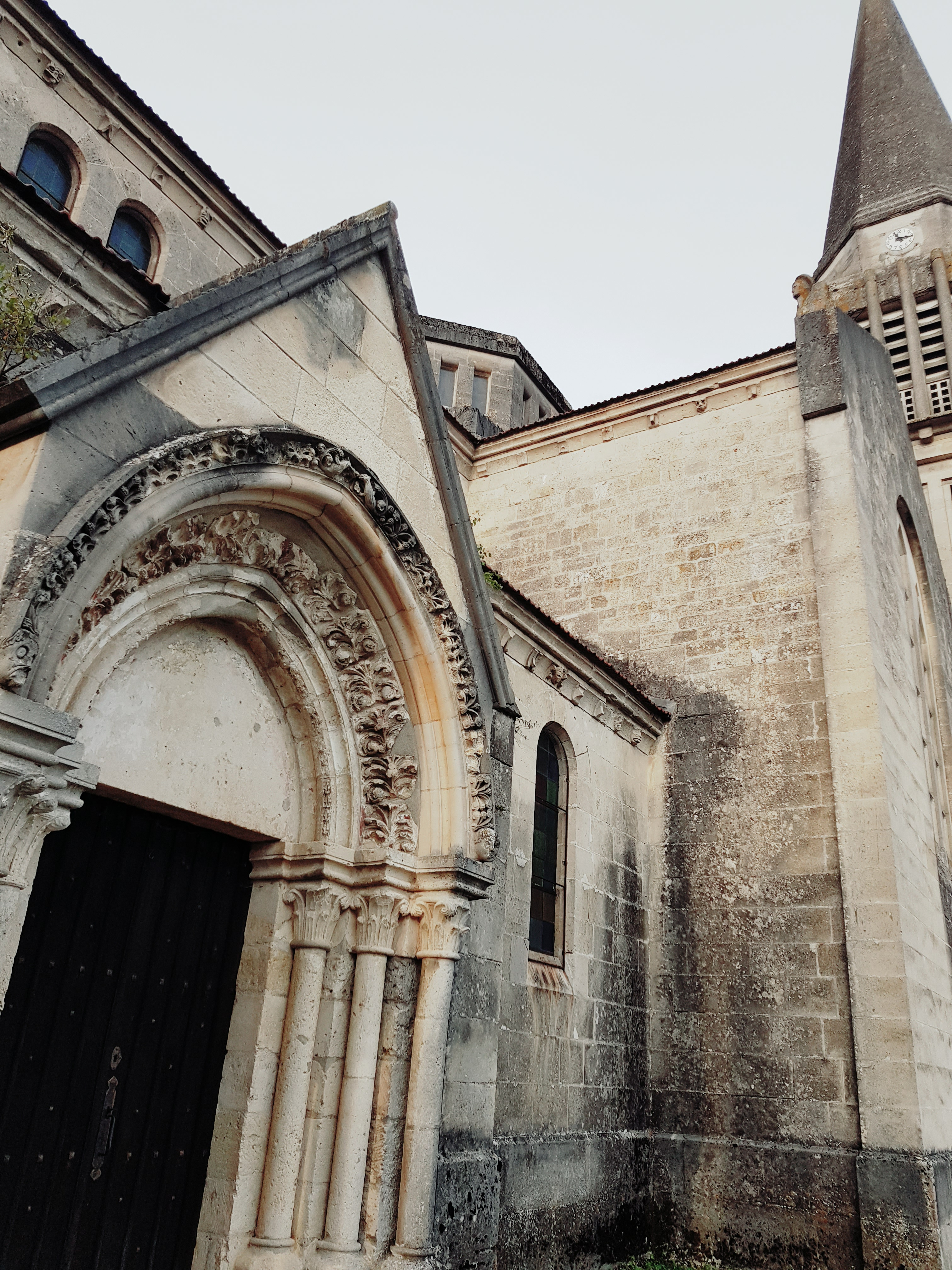 Portail classé de l' Église Saint-Médard d'Aizy-Jouy